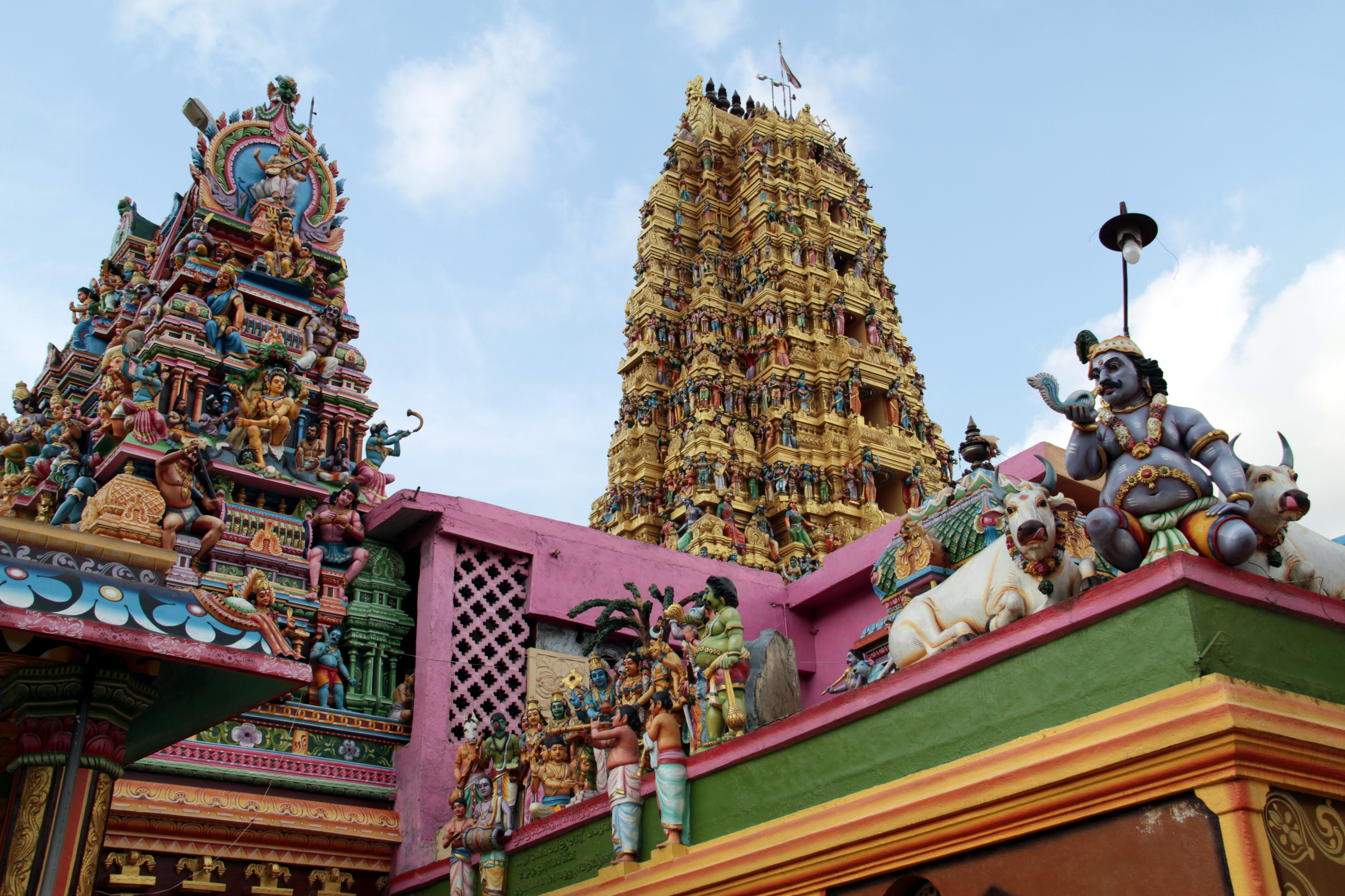 Sri Lanka, temple hindou